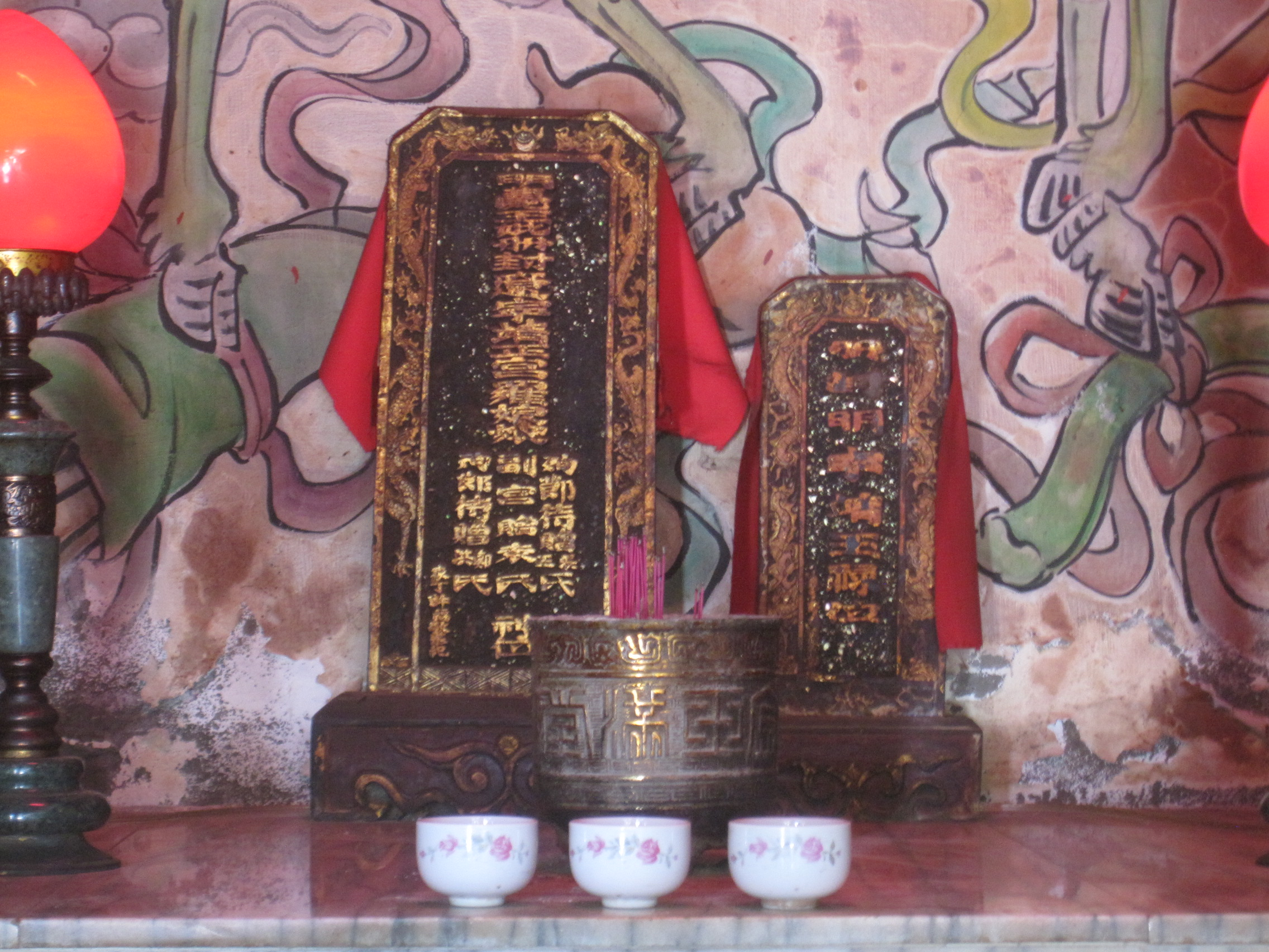 竹滬華山殿供奉之牌位